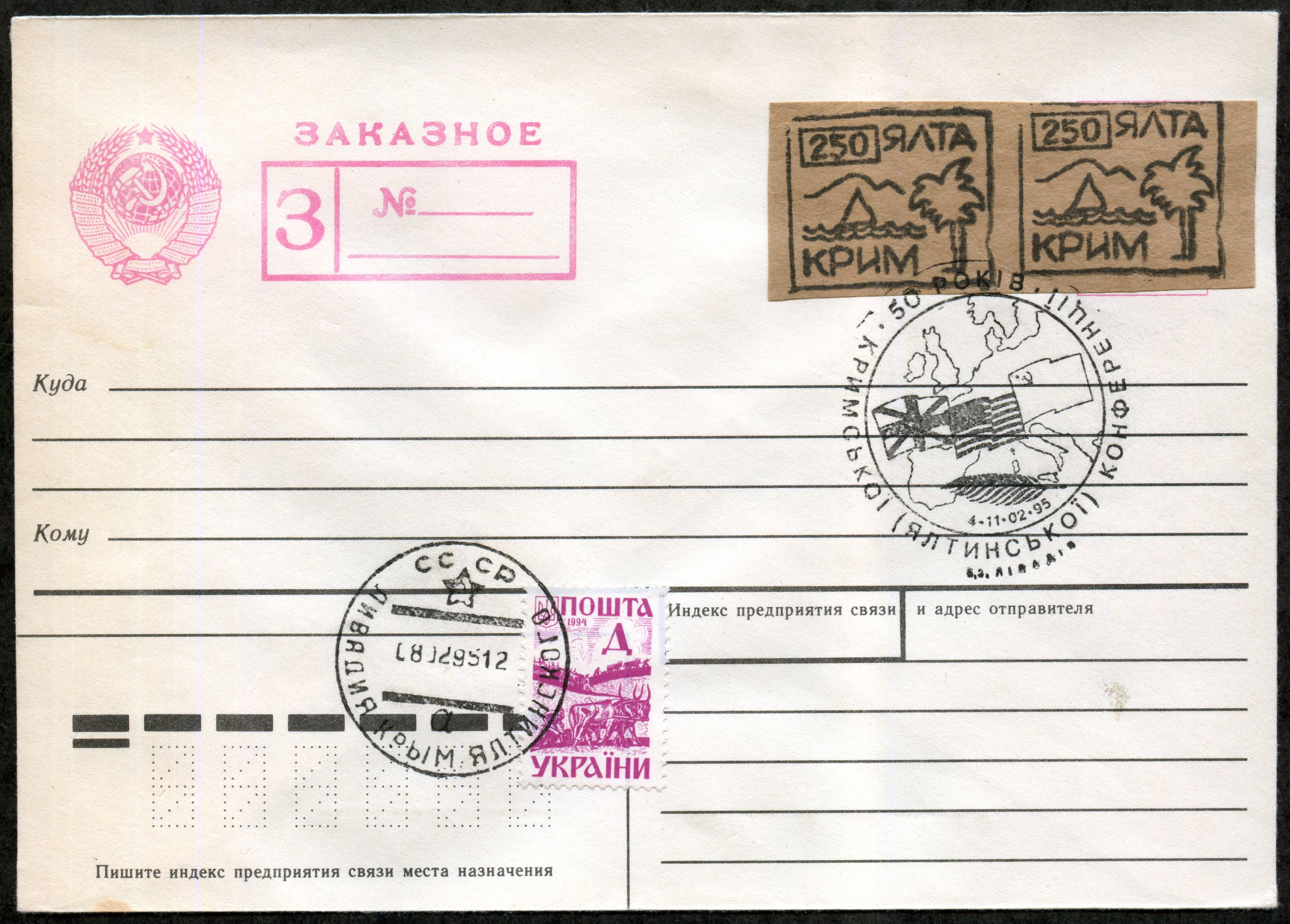 Конверт Украины